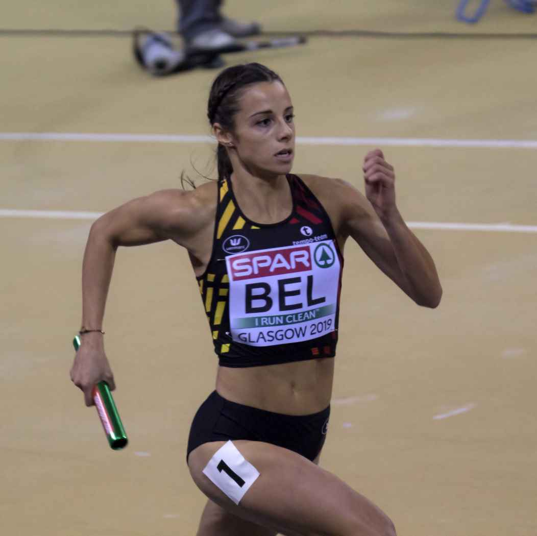 EKI30725 4x400m dames laus